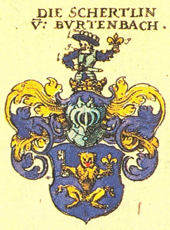 Ritterschaft und Adel in Schwaben Die Schertlin von Burtenbach